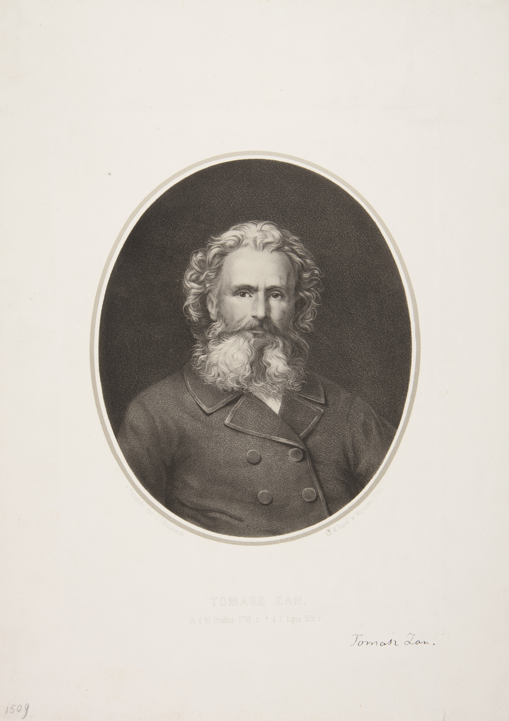 Беларуская (тарашкевіца): Партрэт Тамаша Зана (Tamaš Zan)